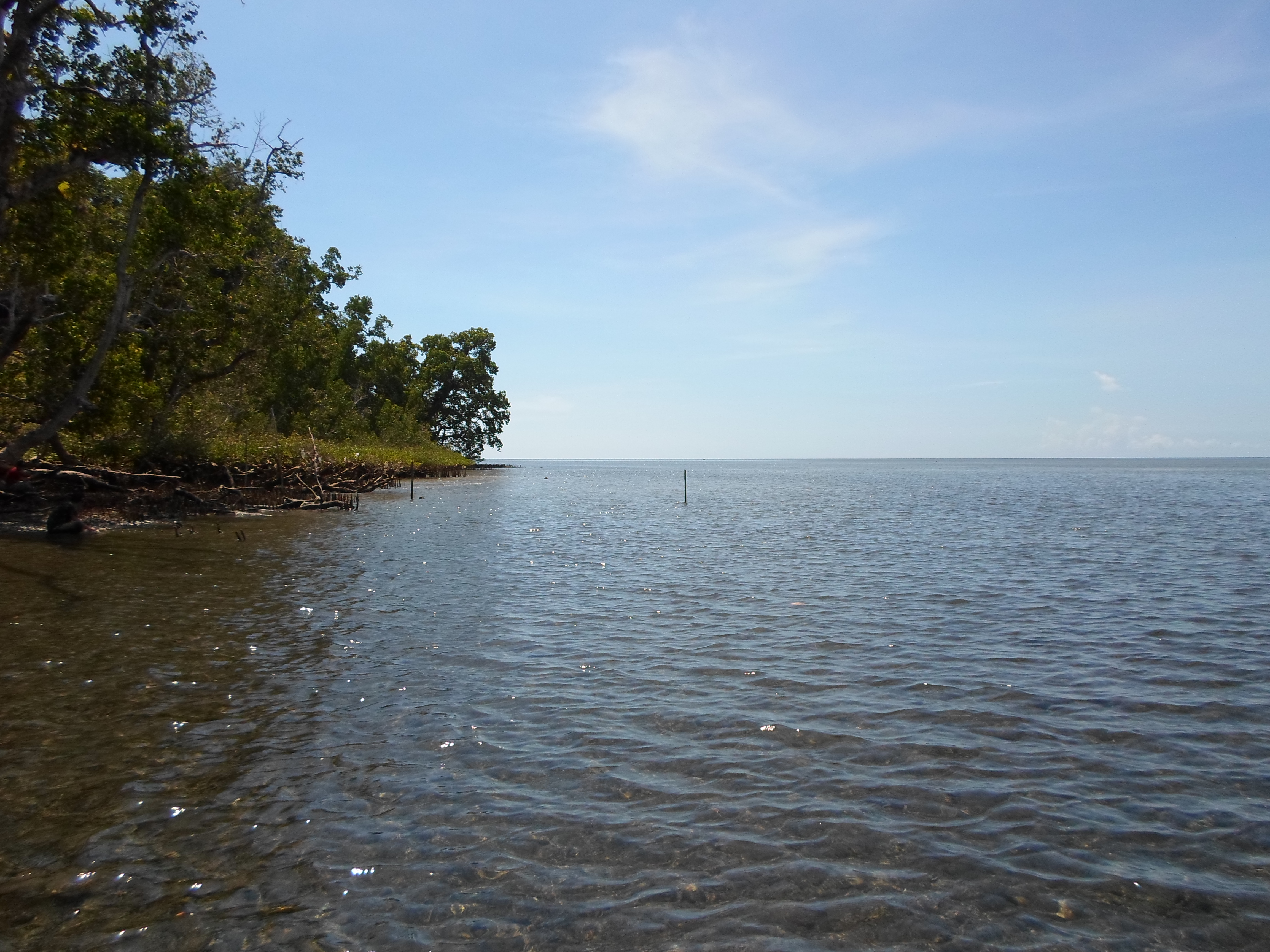 Laut Lepas